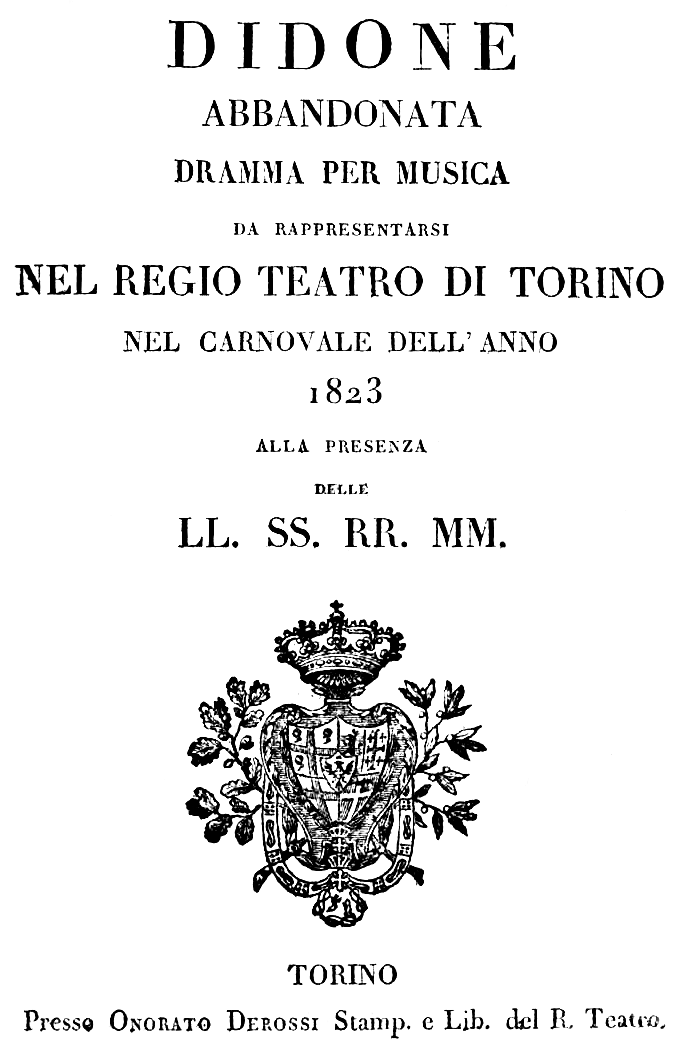 Saverio Mercadante - Didone abbandonata - title page of the libretto - Turin 1823